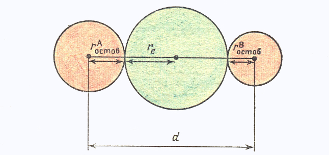 Строение ковалентной связи